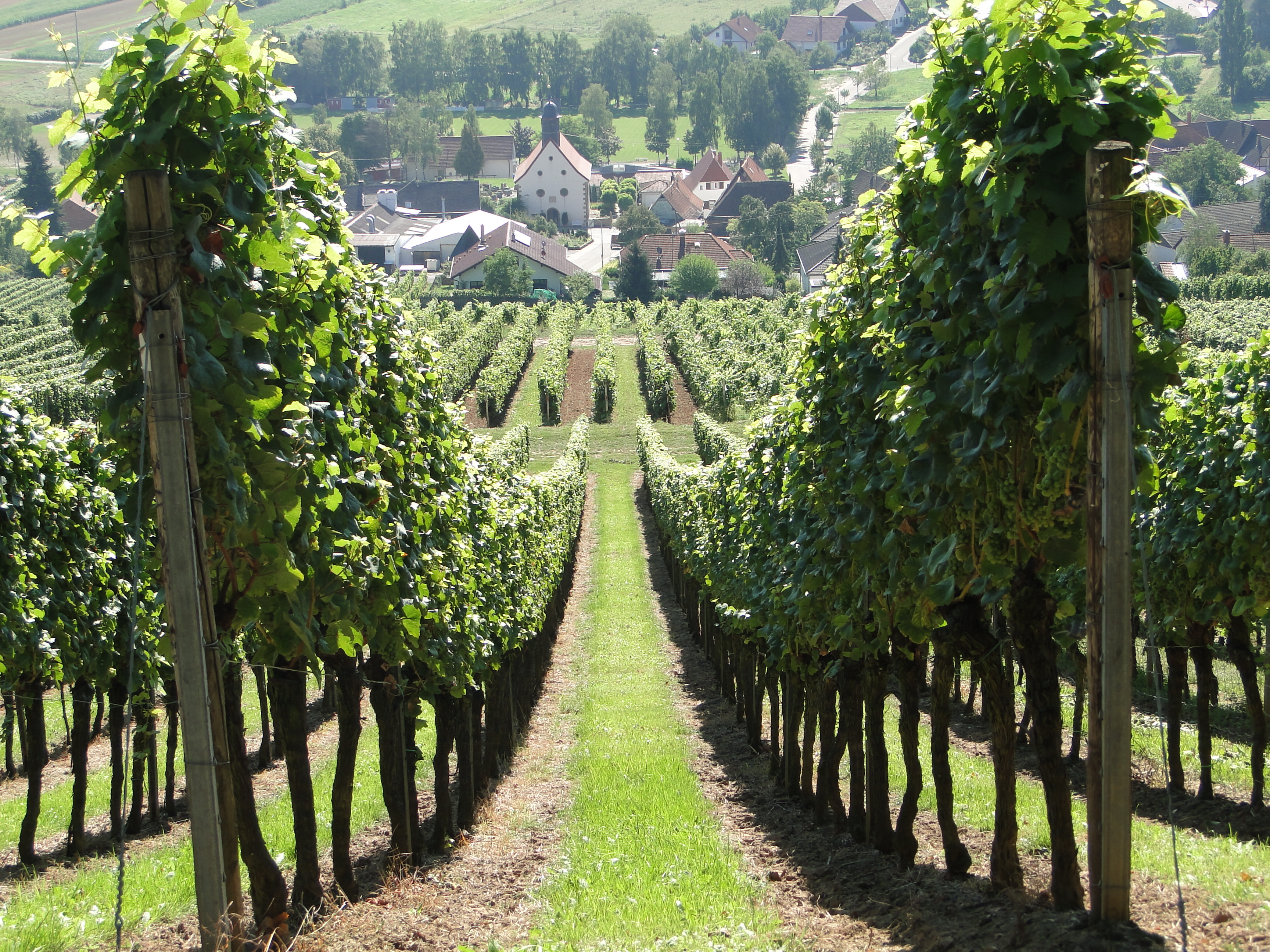 Weinberge bei Pleisweiler in der Südpfalz